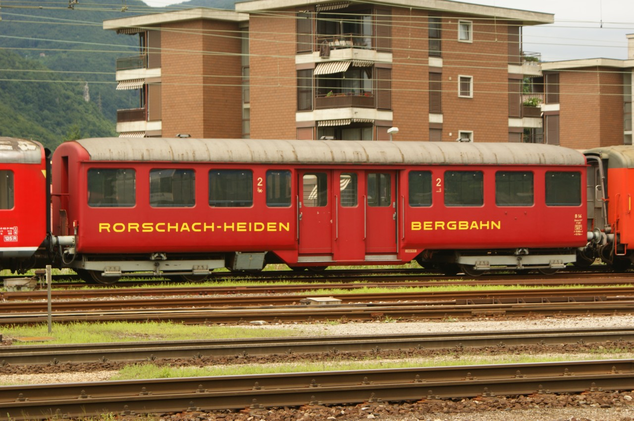 Mittleinstiegswagen C4 25 in kurzer Leichtstahlbauart (SIG 1948) der Wohlen-Meisterschwanden-Bahn (WM), 1974 an die Rorschach-Heiden-Bergbahn verkauft als B 14, 1998 zum Club San Gottardo in Mendrisio gekommen, wo ein Jahr früher schon der gleichartige B 26 der WM eingetroffen war.